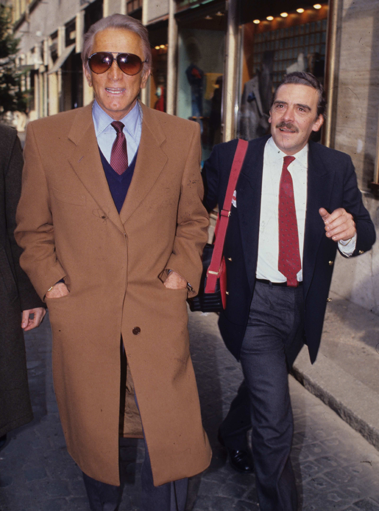 Barillari Rino, Archivio Barillari Story, Negativo a colori, GFDL